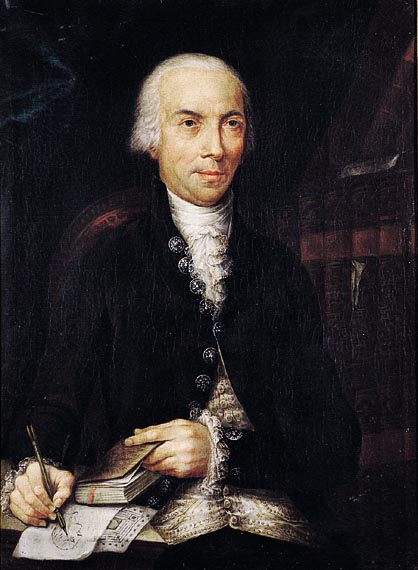 Retrato de Pere Pau Montanya, óleo sobre lienzo, 89 x 67 cm, Barcelona, Reial Acadèmia Catalana de Belles Arts de Sant Jordi